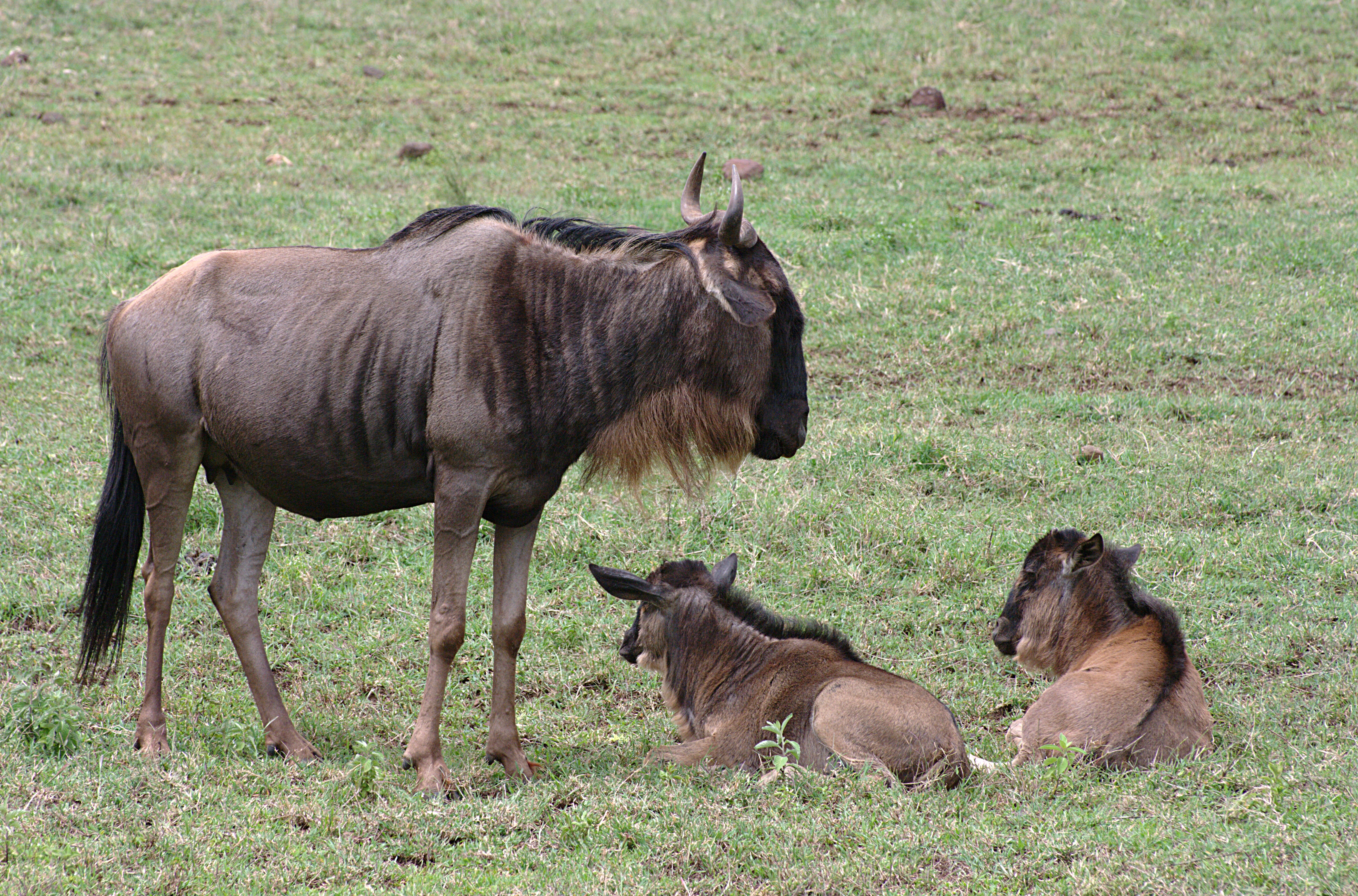 Gnous en famille, Tanzanie, région du Serengeti.